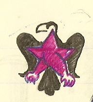 Karykatura z okresu Stanu Wojennego. Rys. Maciej Miezian